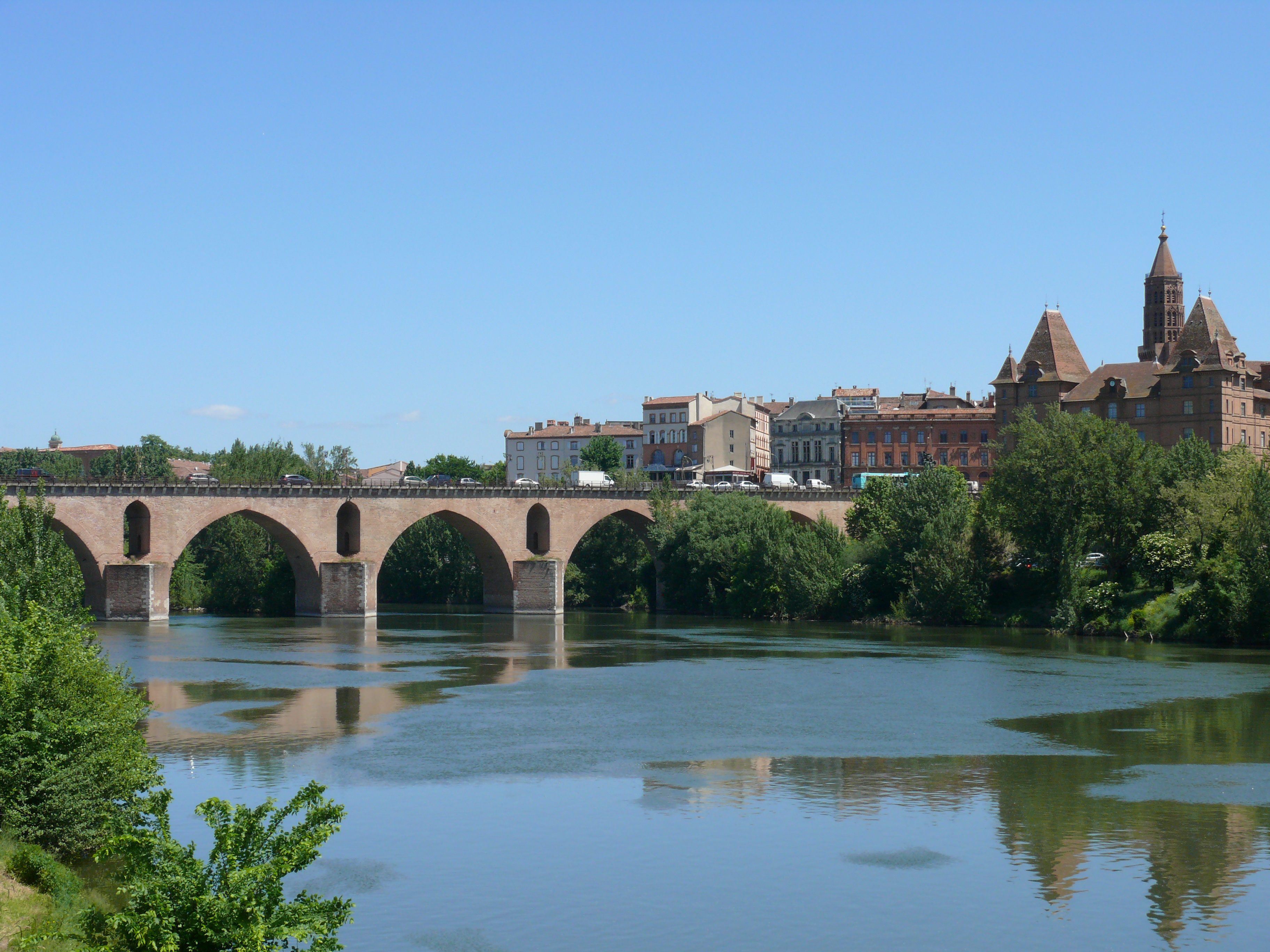 Montauban - Pont Vieux avec le musée Ingres et le clocher de l'église Saint-Jacques